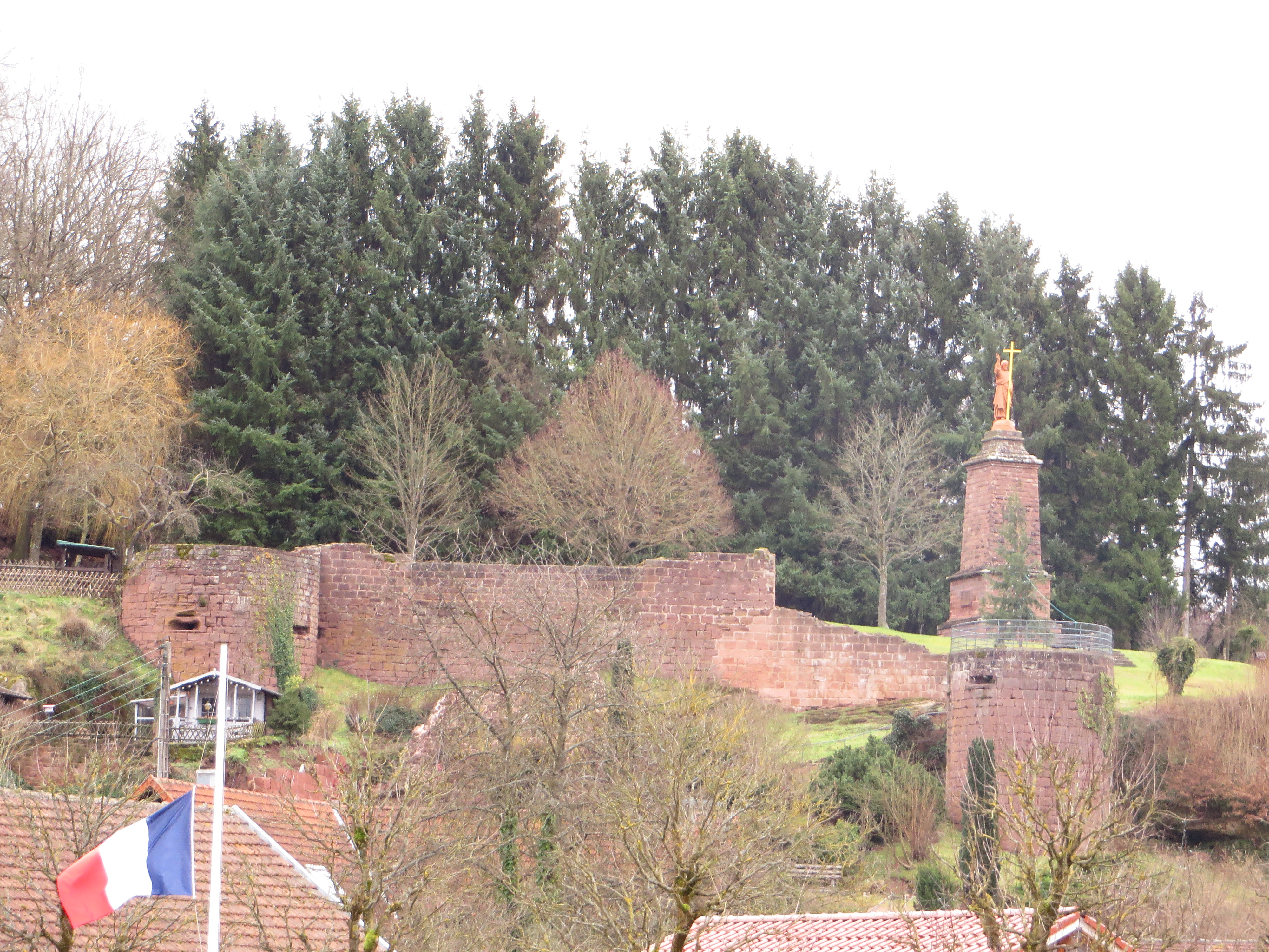 Walschbronn chateau